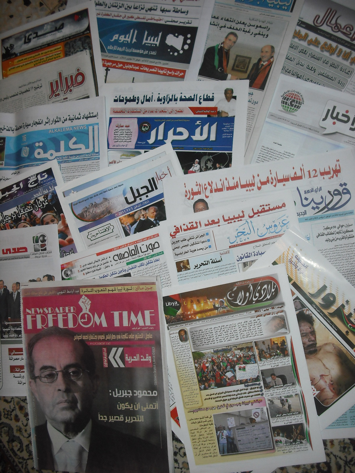 Libya now boasts more than 300 dailies and weeklies, with 180 issued in Benghazi alone. تضم ليبيا اليوم أزيد من 300 صحيفة يومية وأسبوعية منها 180 تصدر في بنغازي وحدها. La Libye compte aujourd'hui plus de 300 quotidiens et hebdomadaires, dont 180 publiés dans la seule ville de Benghazi.